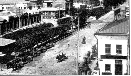 Московский проспект, Барнаул.